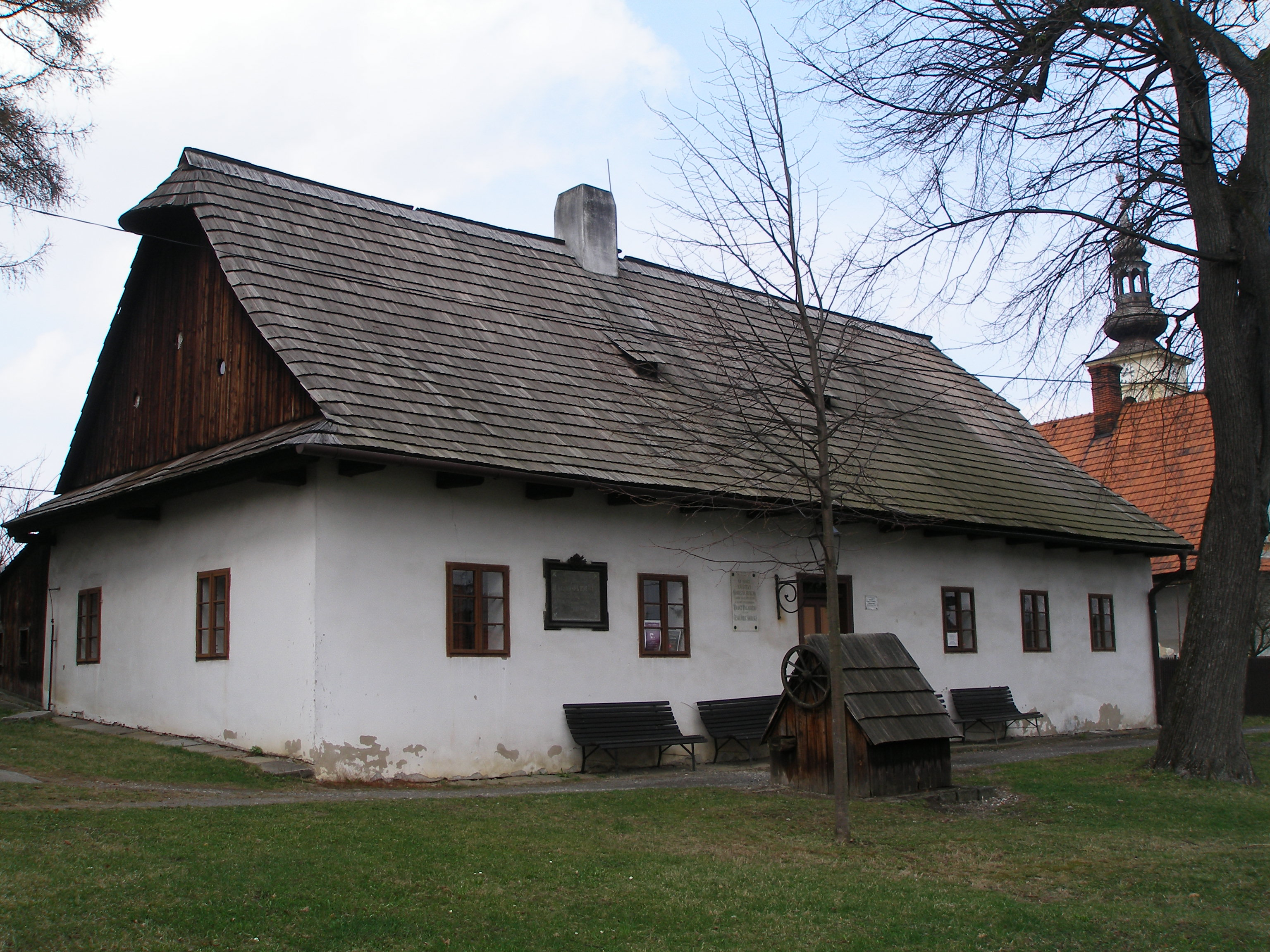 Rodný dům Františka Palackého (pohled od jihu).